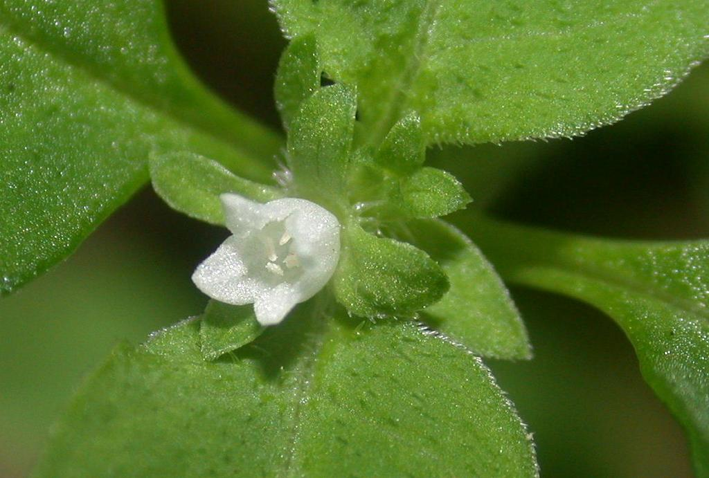 Hedyotis lindleyana var. hirsta：ハシカグサ 2002/08/03 和歌山県田辺市：Tanabe City. Wakayama pref. Japan